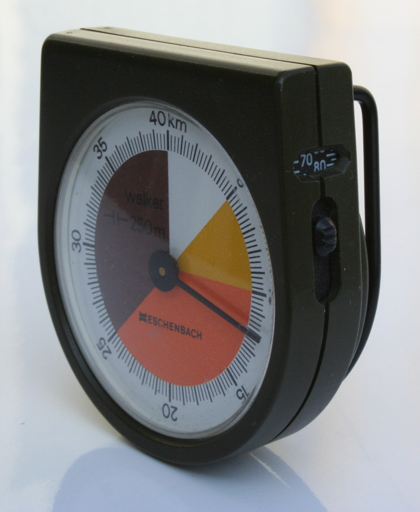 Pedometer